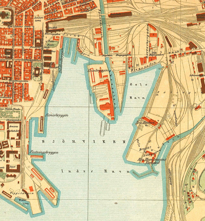 Kart over Bjørvika.